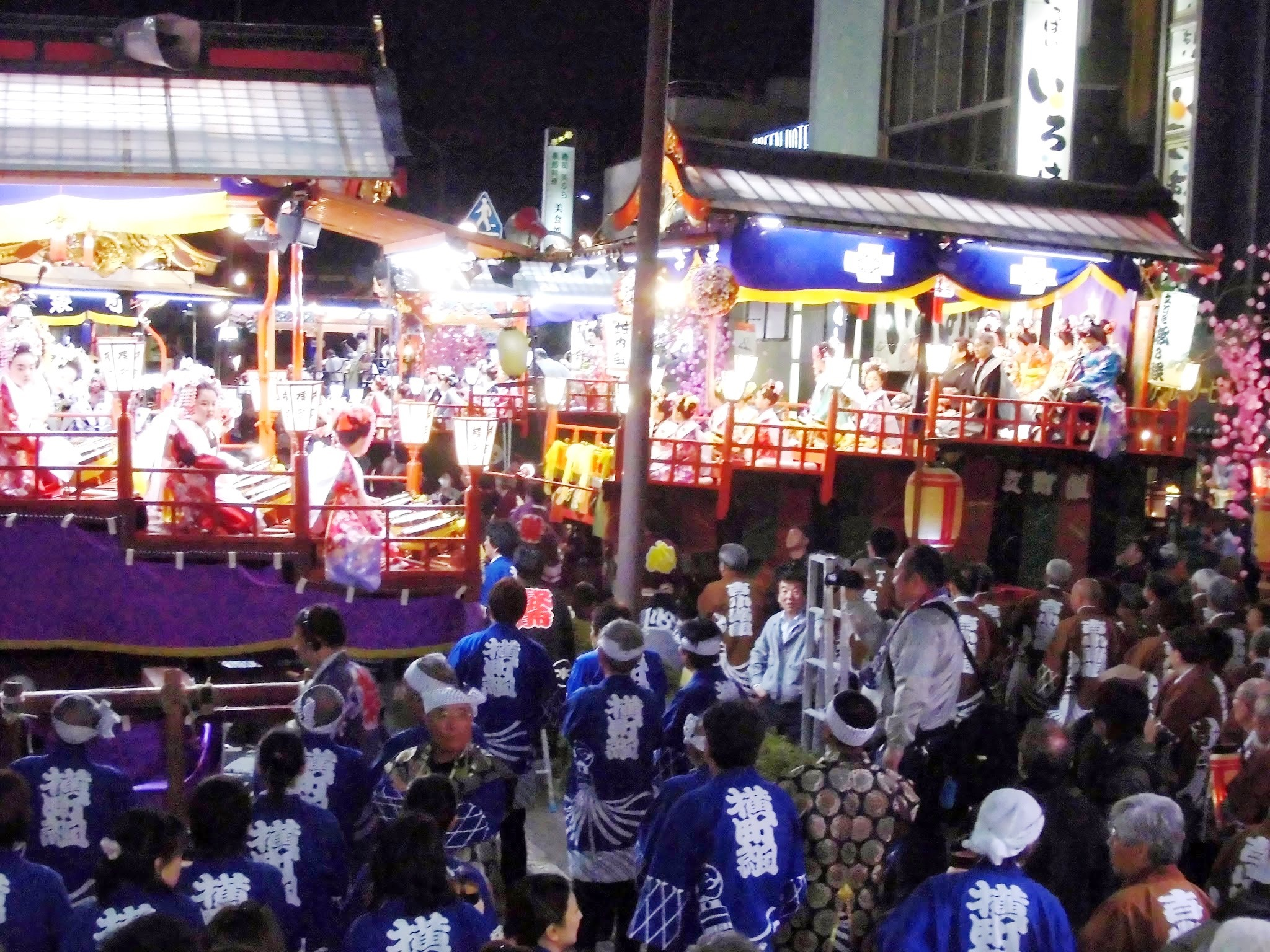 全囃子屋台が駅前に集合し一斉に囃子を披露する